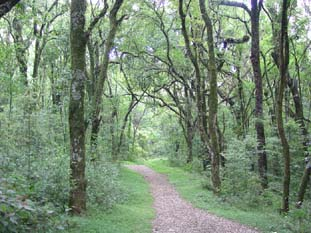 Dentro do Parque Longines Malinowski, em Erechim.